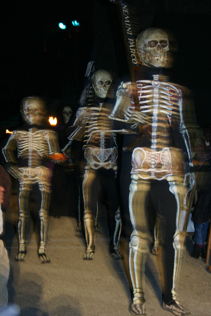 Dansa de la Mort, a Verges (L'Alt Empordà). Autor: bernatff